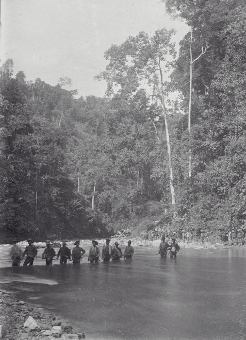 Foto. Een militaire patrouille tijdens het oversteken van een rivier op Atjeh